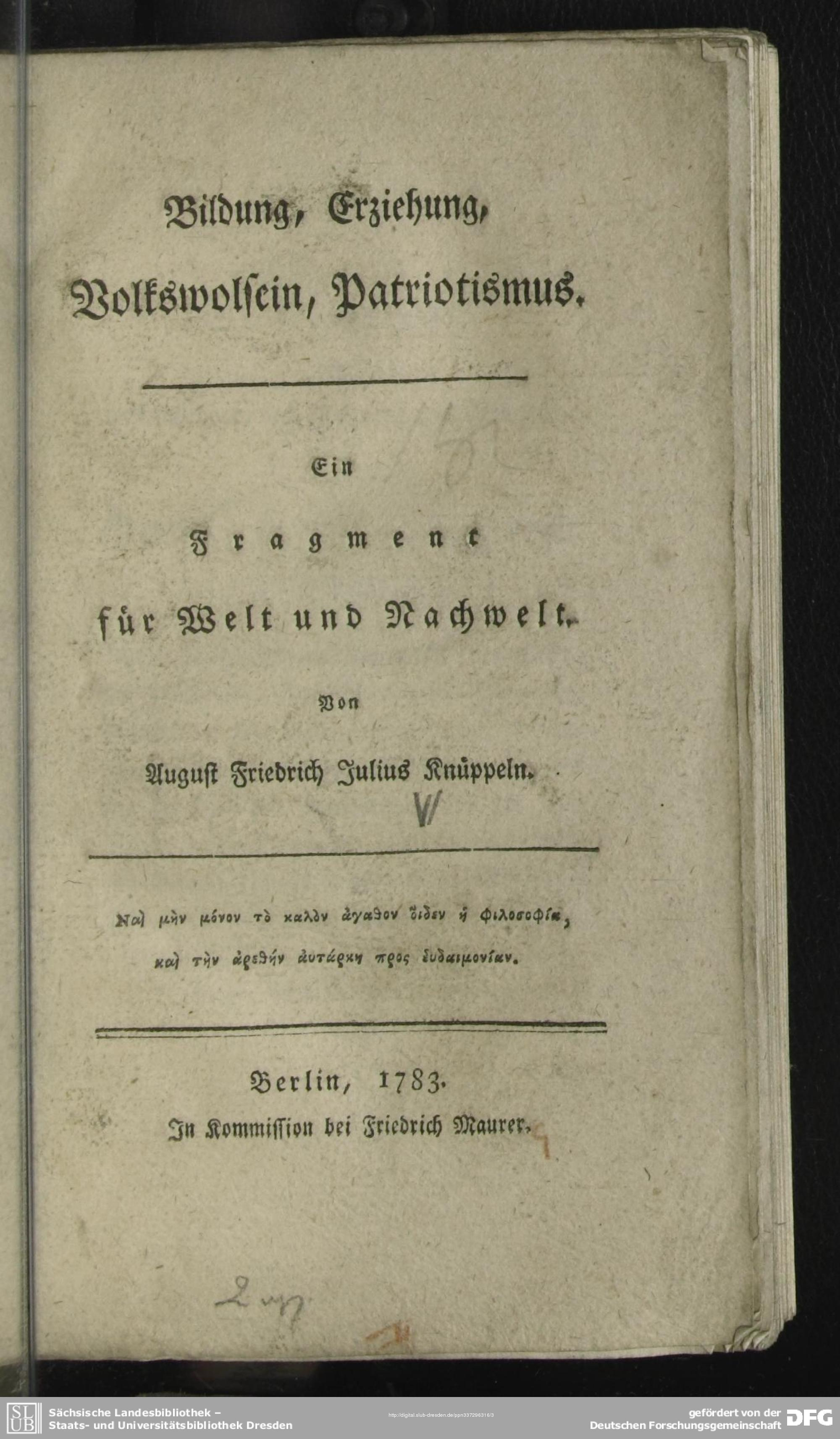 August Julius Friedrich Knüppeln Bildung, Erziehung, Volkswolsein, Patriotismus, Berlin : Maurer, 1783